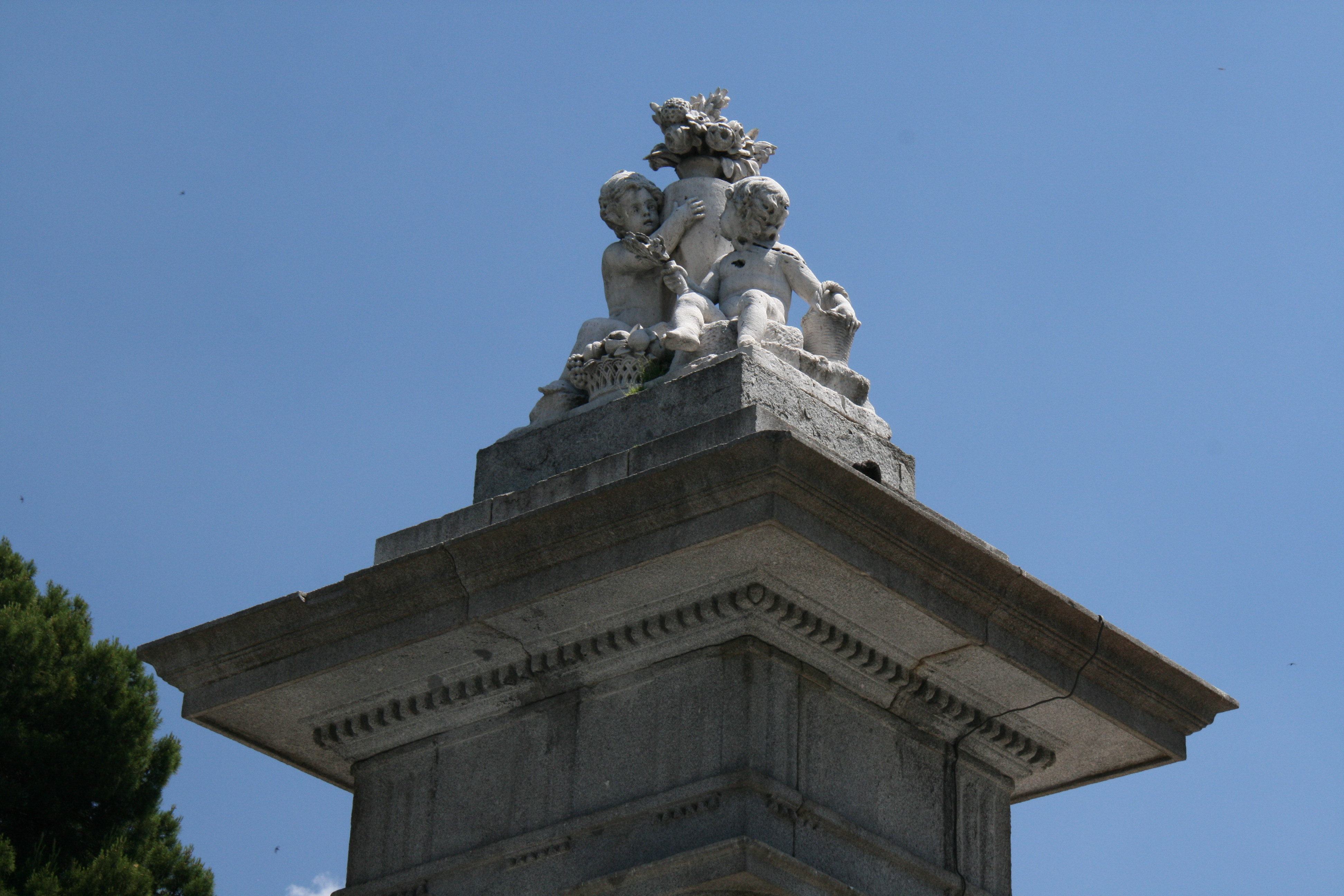 Detalle de la Puerta de la Independiencia